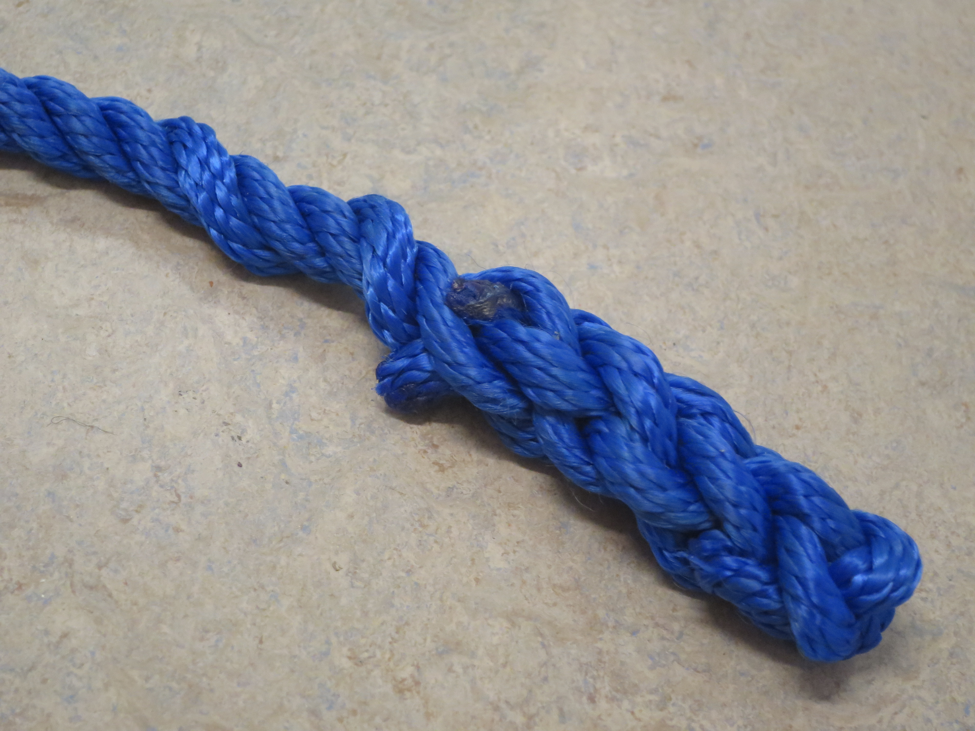 Endespleis